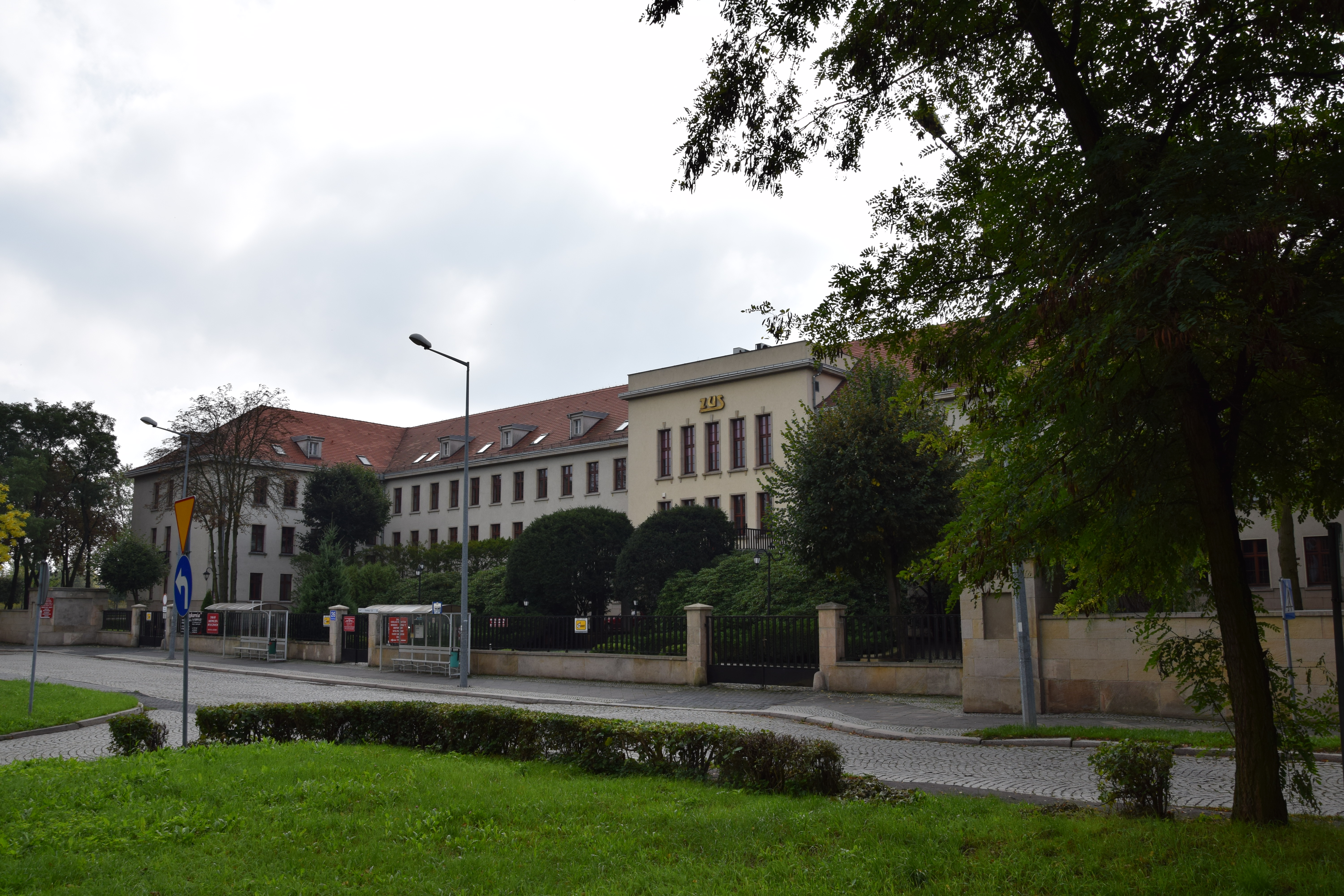 Legnica, komendantura garnizonu Wermachtu, ob. ZUS, 1937